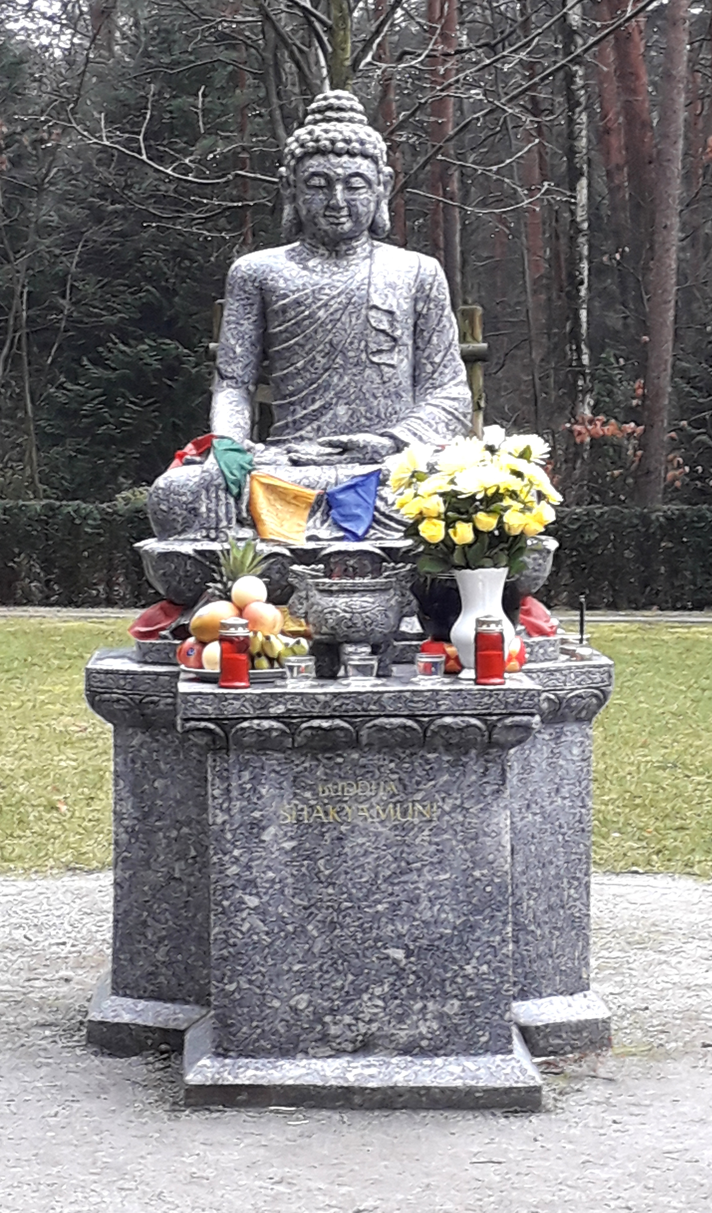 Buddha-Statue auf dem Heidefriedhof Dresden. errichtet 2015 aus vietnamesischem Granit. etwa 2,5 Meter hoch, 10 Tonnen schwer